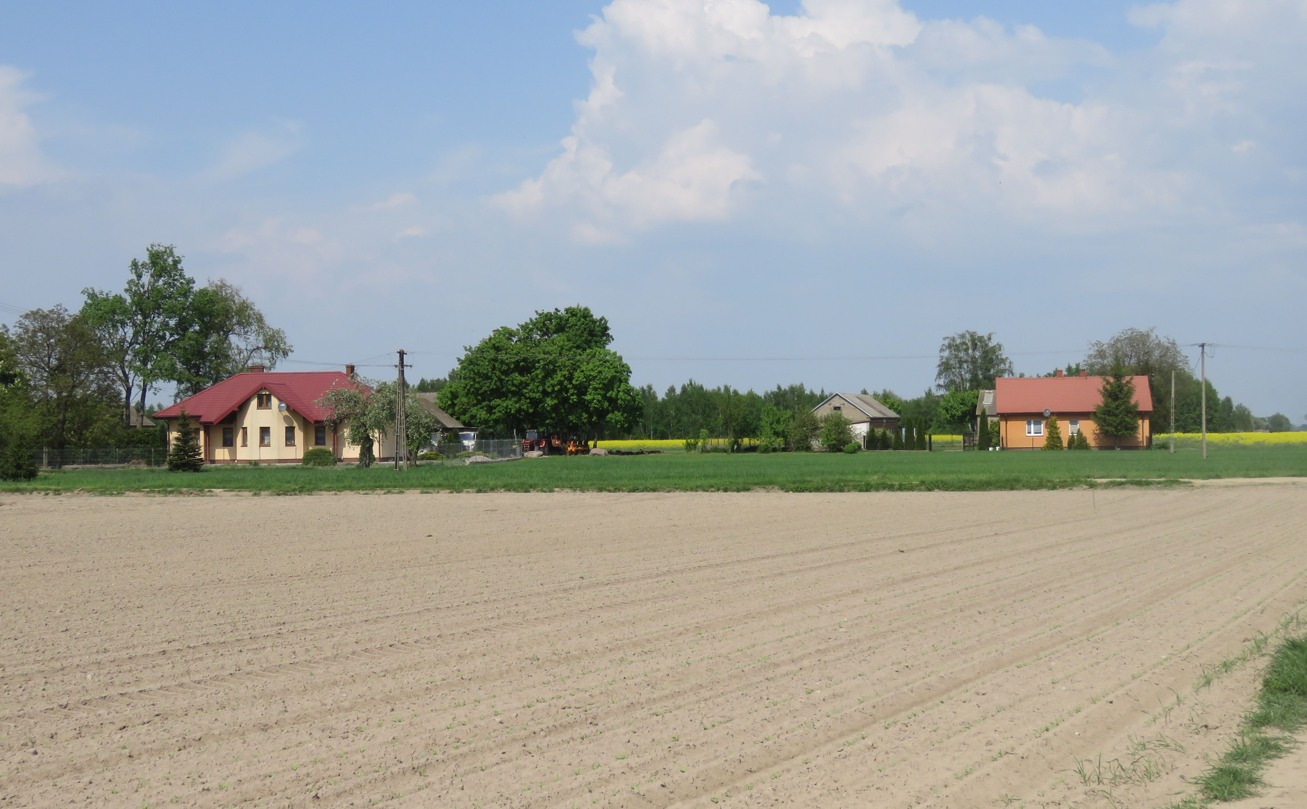 Dziewanowo